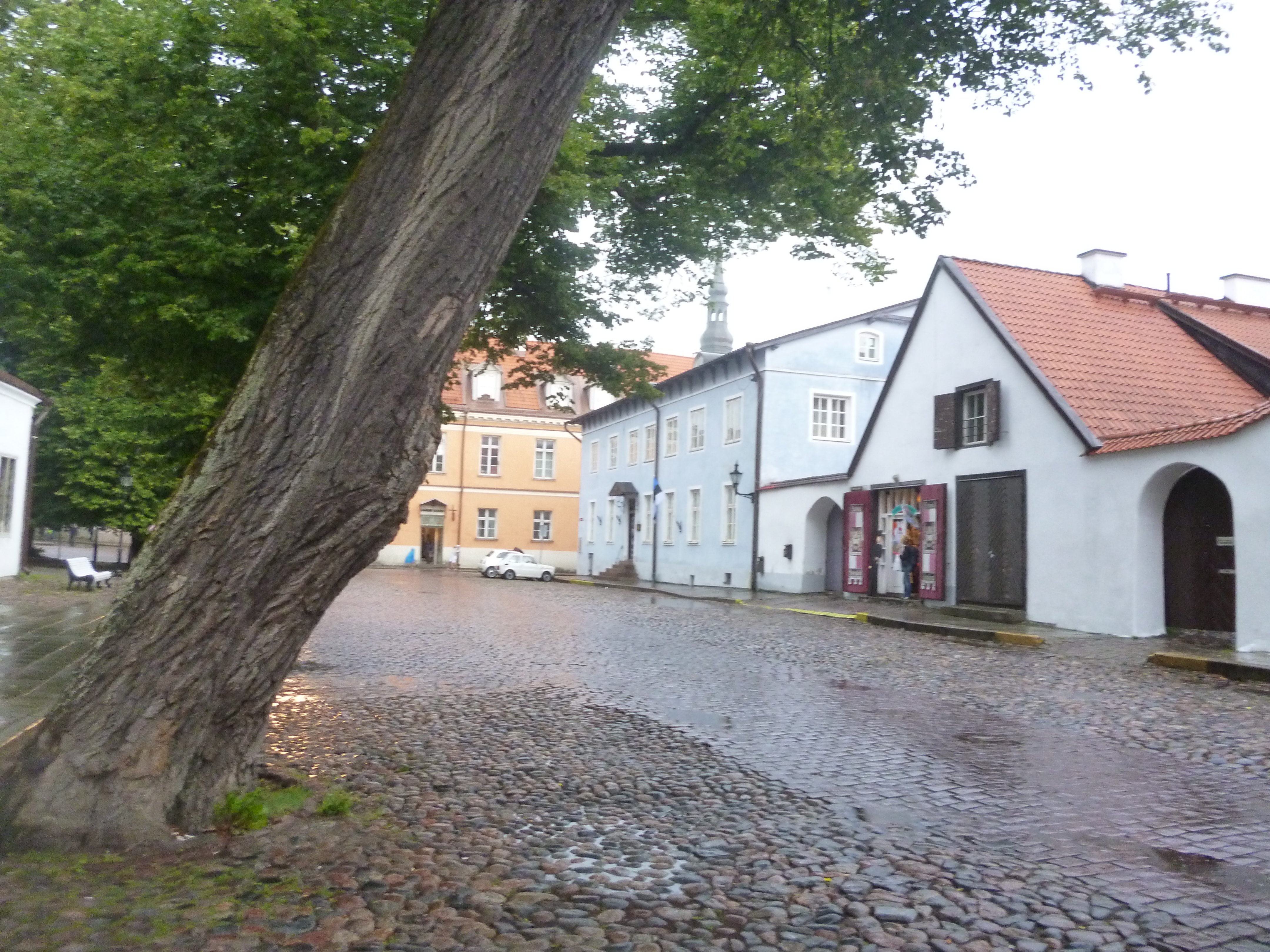 Tallinn